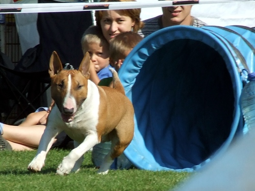 Międzynarodowa Wystawa Psów Rasowych, Wrocław 2006.